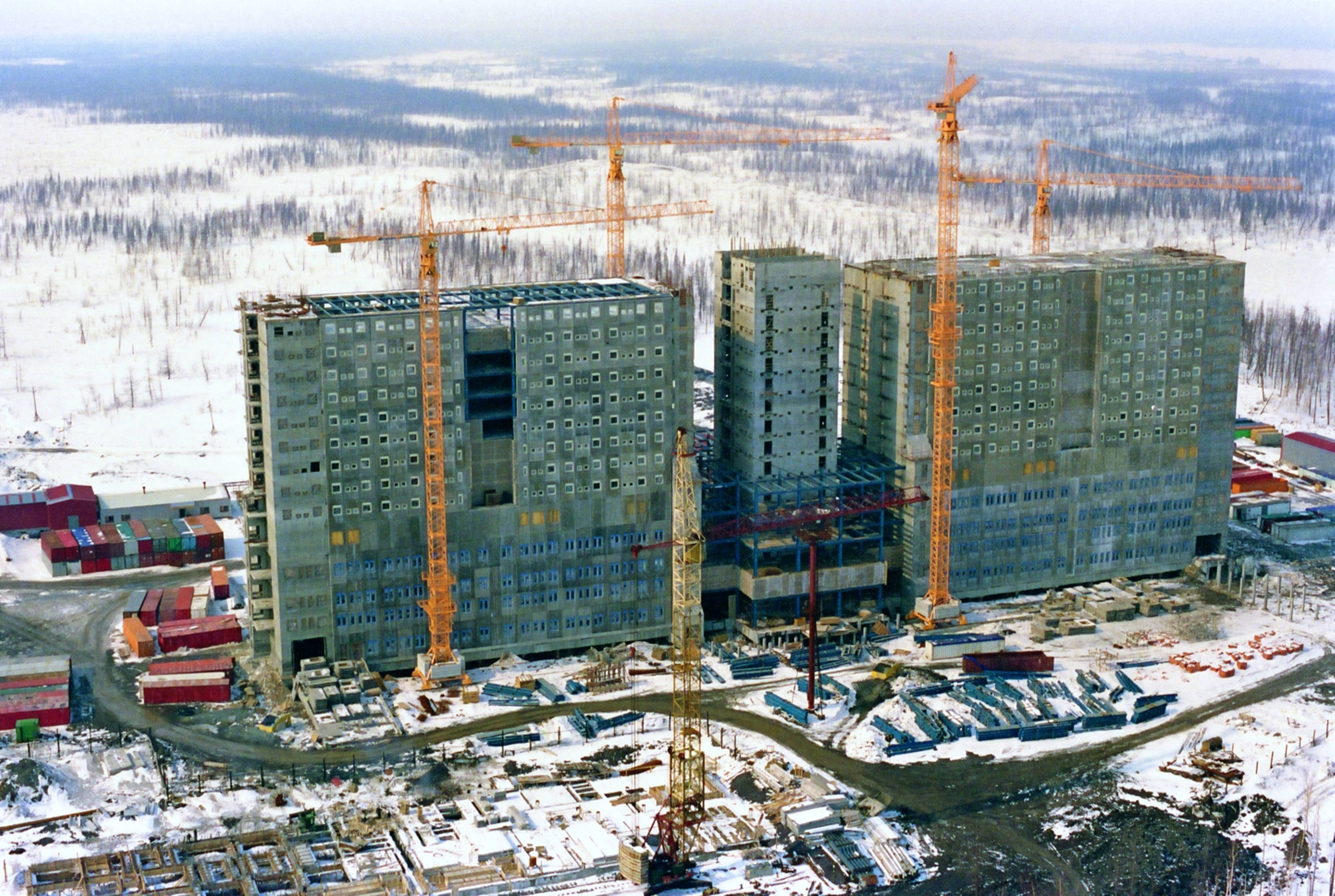 Строительство нового здания для МБУЗ "Городская больница №1" Норильск